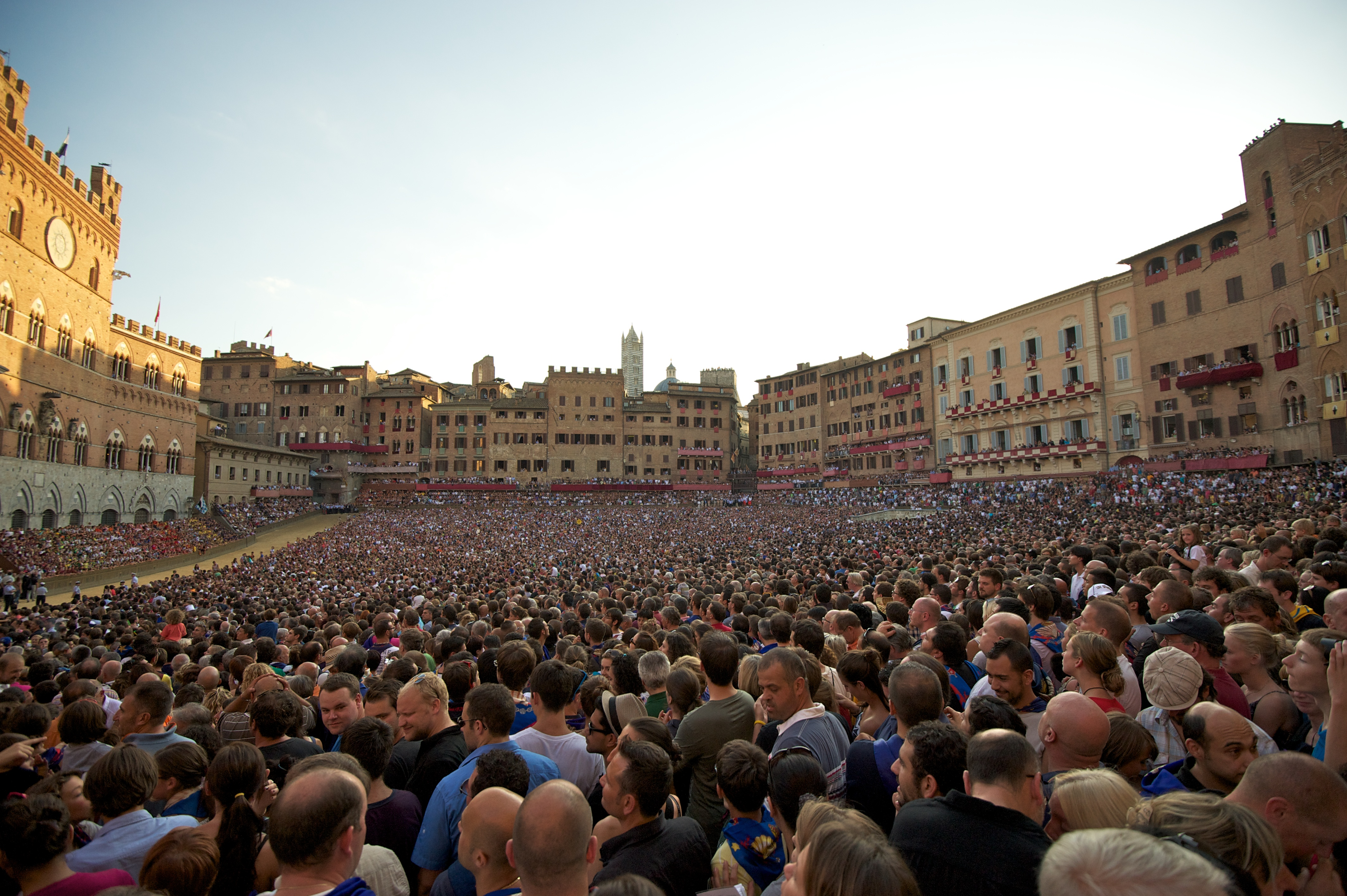 Palio di Siena - Assunta 2011 - Piazza del Campo